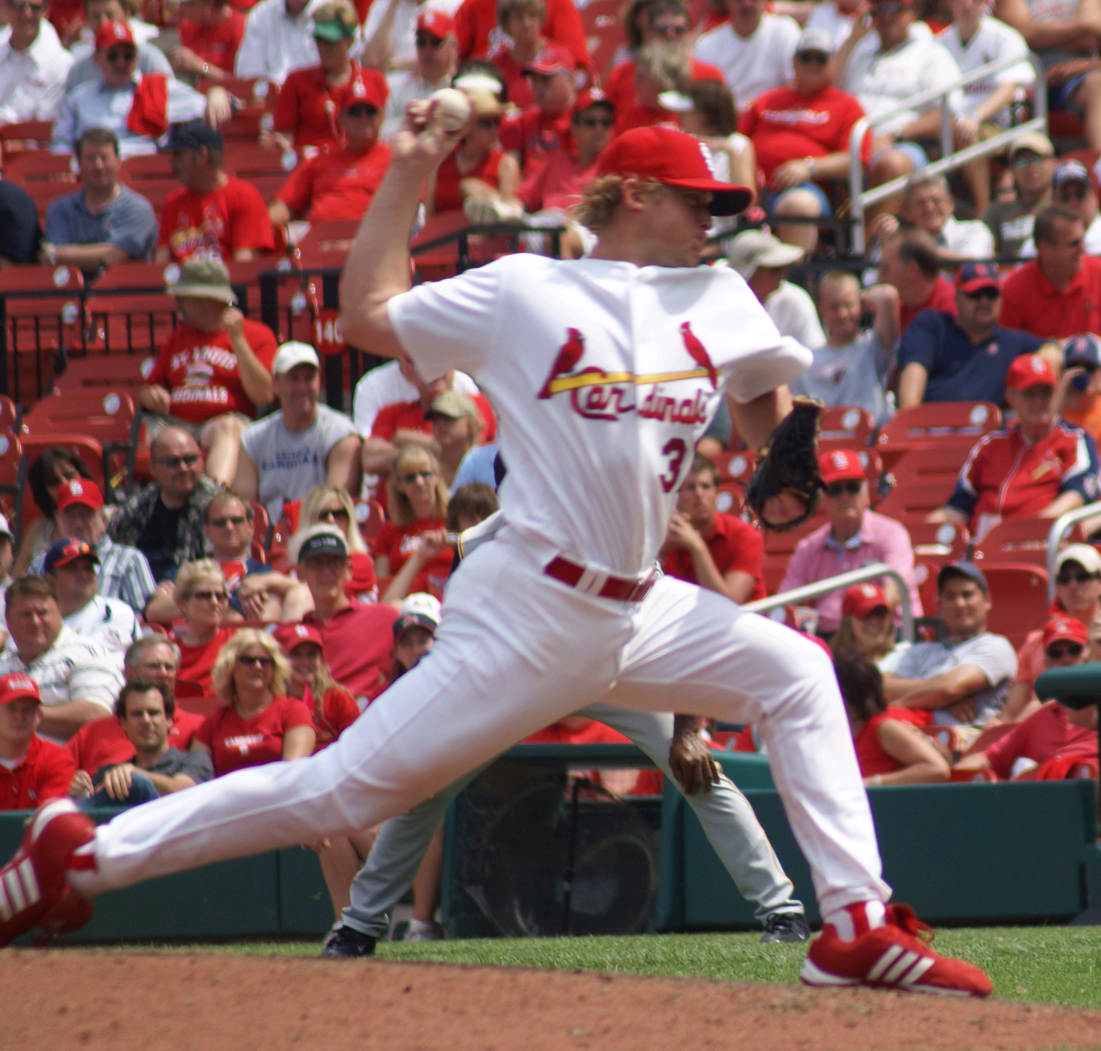 Todd Wellemeyer